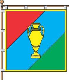 Baranivka h